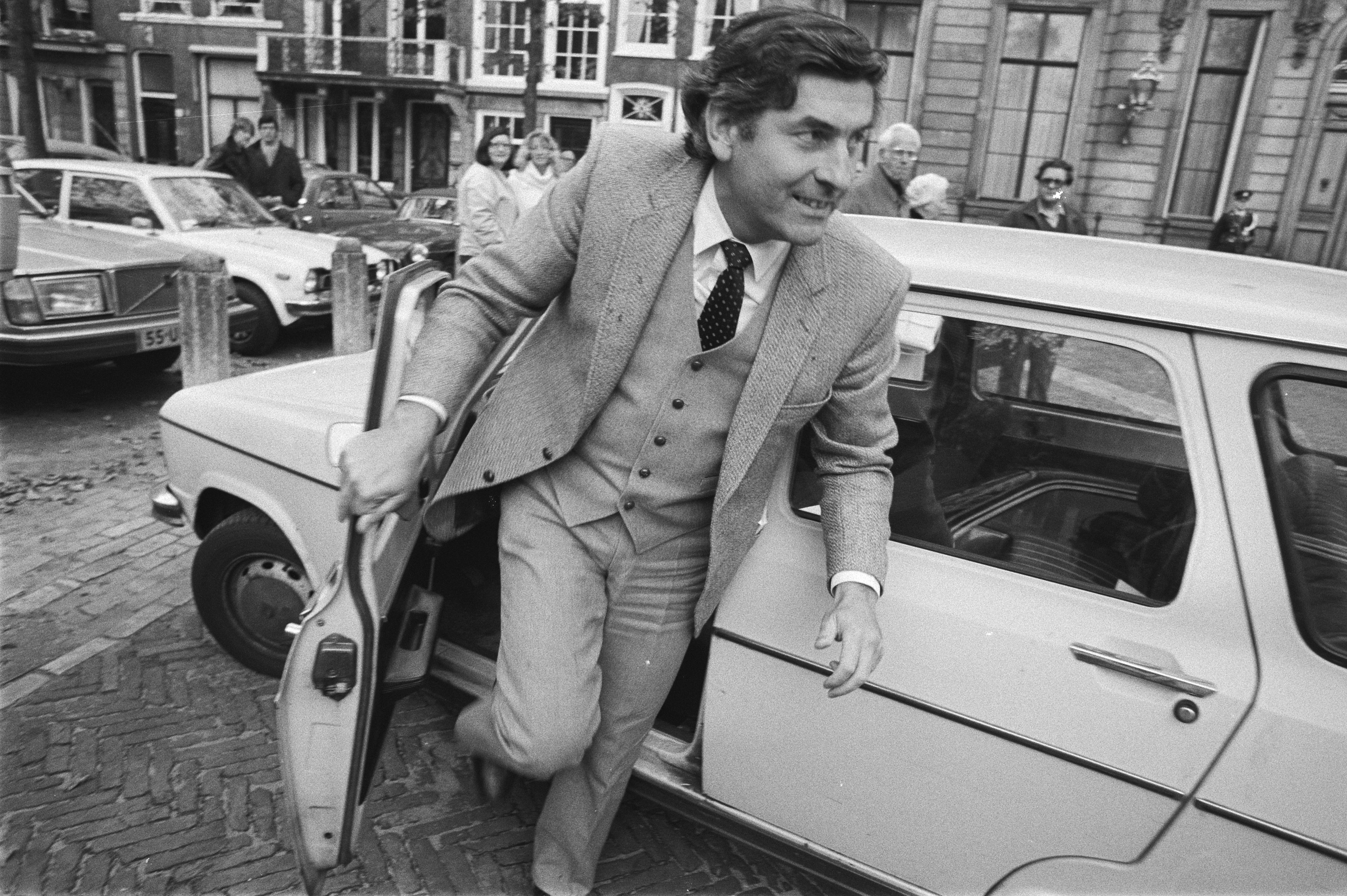 Collectie / Archief : Fotocollectie Anefo Reportage / Serie : Kabinetcrisis; Koningin Beatrix heeft de fraktievoorzitters ontvangen op Paleis Lange Voorhout Beschrijving : Fractieleider Lubbers (CDA) stapt uit zijn auto voor Paleis Lange Voorhout Datum : 16 oktober 1981 Locatie : Den Haag, Zuid-Holland Trefwoorden : auto's, fractieleiders, politici, portretten Persoonsnaam : Beatrix, koningin, Lubbers, Ruud Instellingsnaam : Paleis Lange Voorhout Fotograaf : Bogaerts, Rob / Anefo Auteursrechthebbende : Nationaal Archief Materiaalsoort : Negatief (zwart/wit) Nummer archiefinventaris : bekijk toegang 2.24.01.05 Bestanddeelnummer : 931-7438